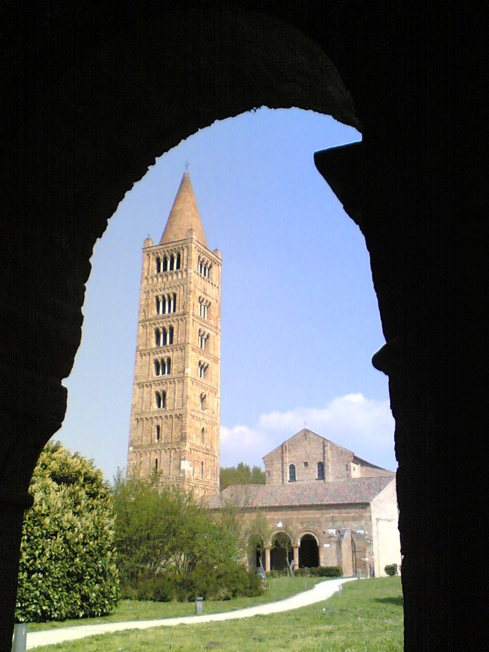 Abbazia di Pomposa - foto realizzata da Utente Microsoikos